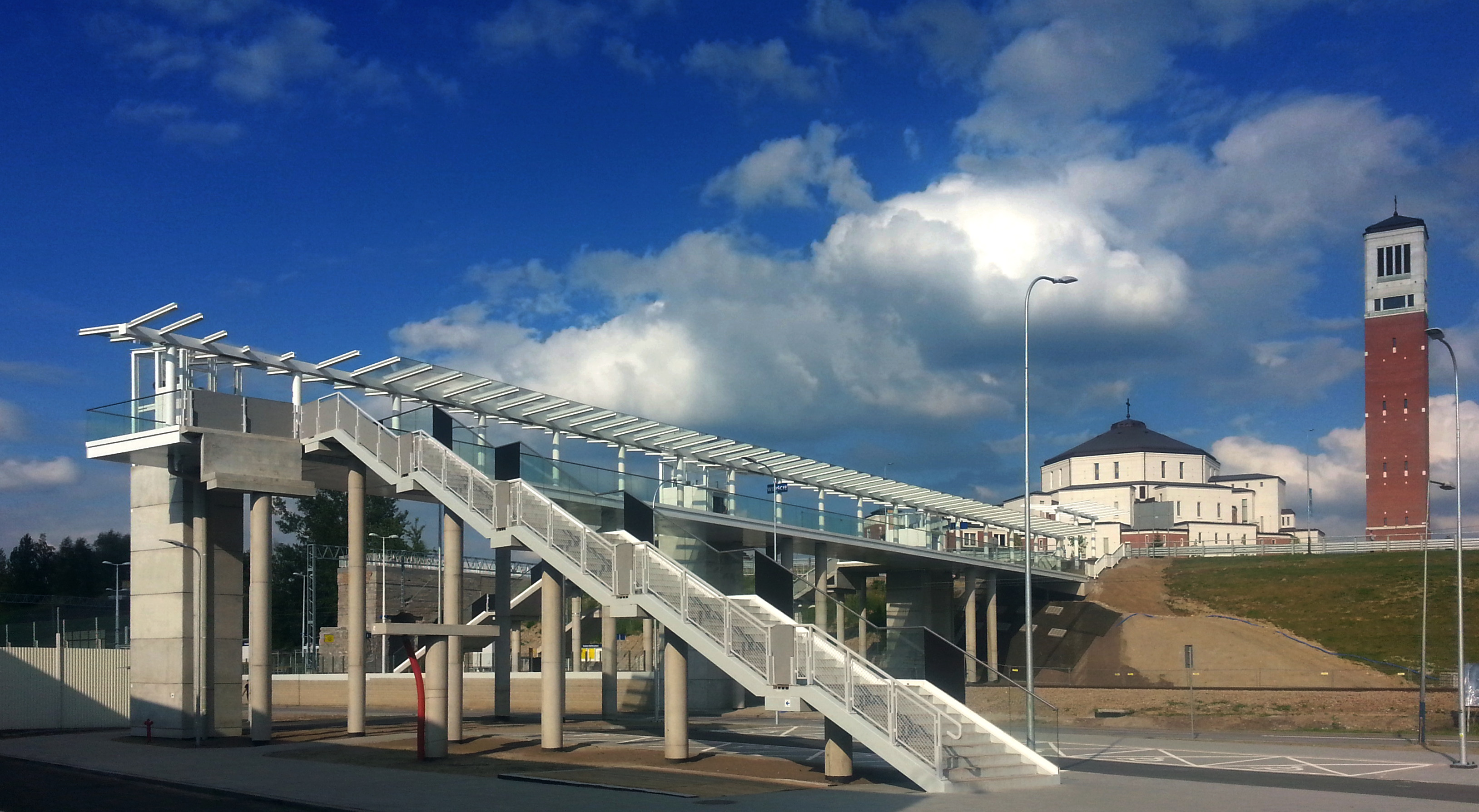 Kładka nad peronami.